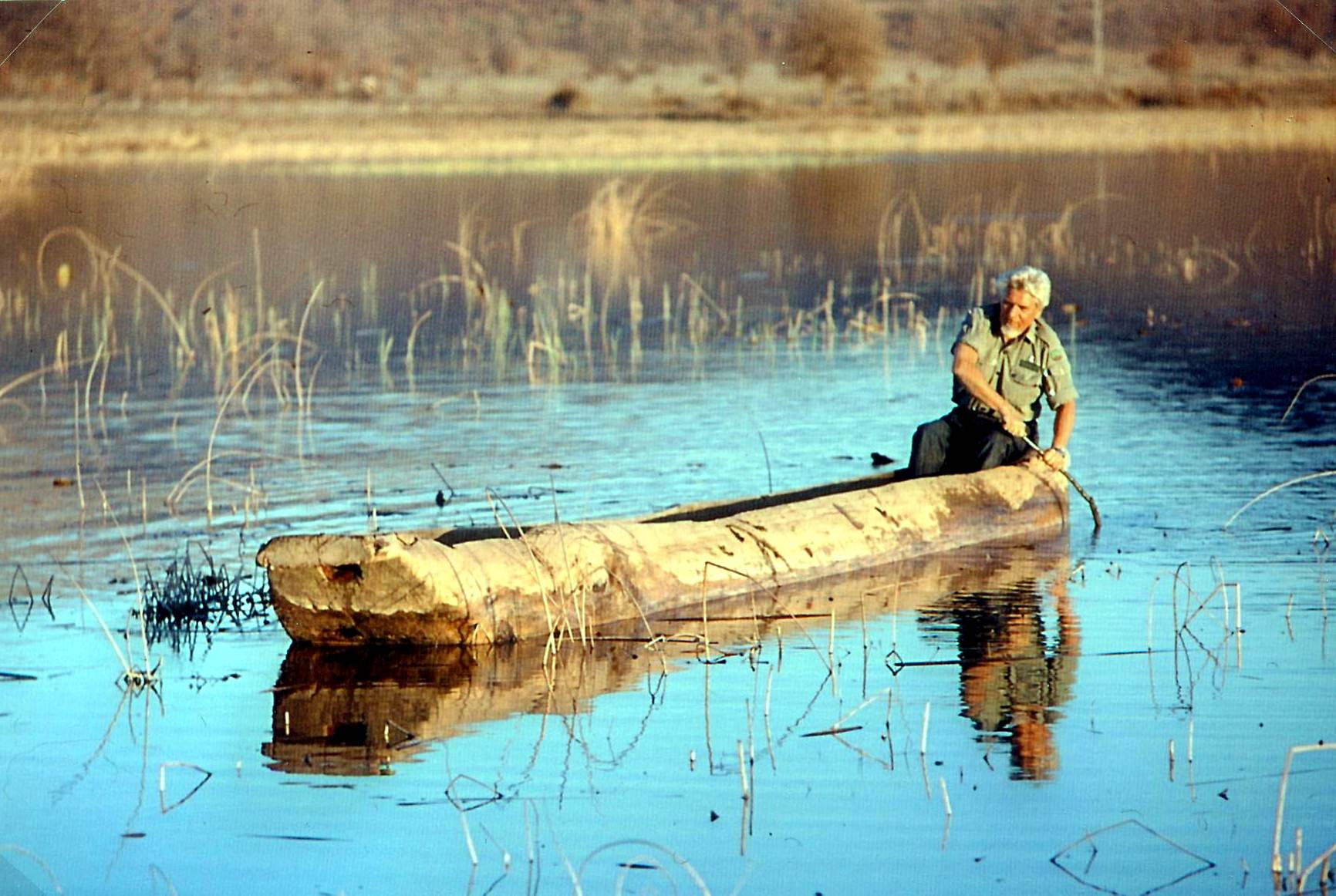 Der Verhaltensforscher Otto Koenig in einem Einbaum. Aufgenommen im Jahr 1972 in der Türkei